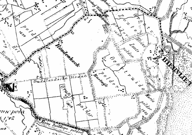 Oranjepolder Biervliet